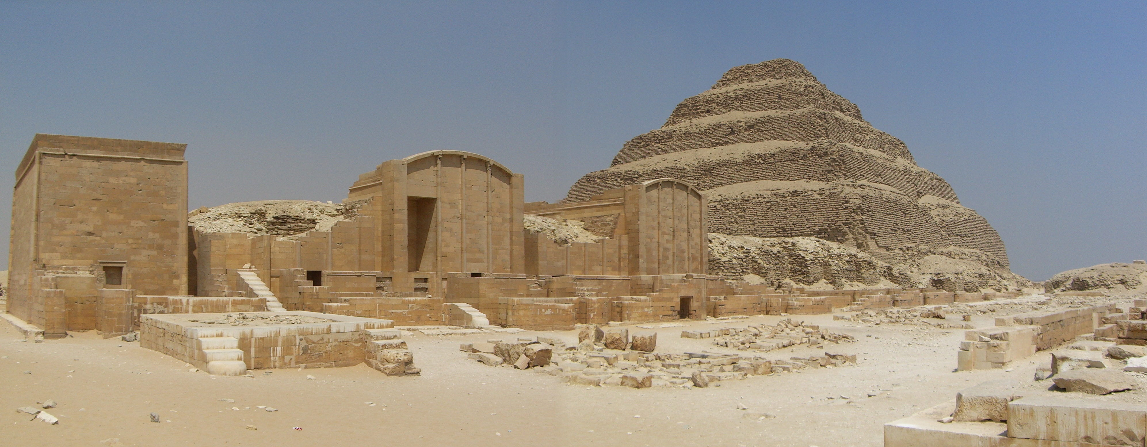 Panorama de la cour du Heb-Sed du complexe funéraire de Djéser - IIIe dynastie égyptienne